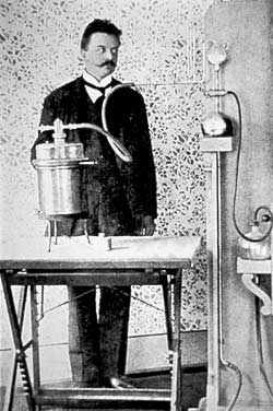 Daniel Swarovski 24.10.1862 — 23.01.1956